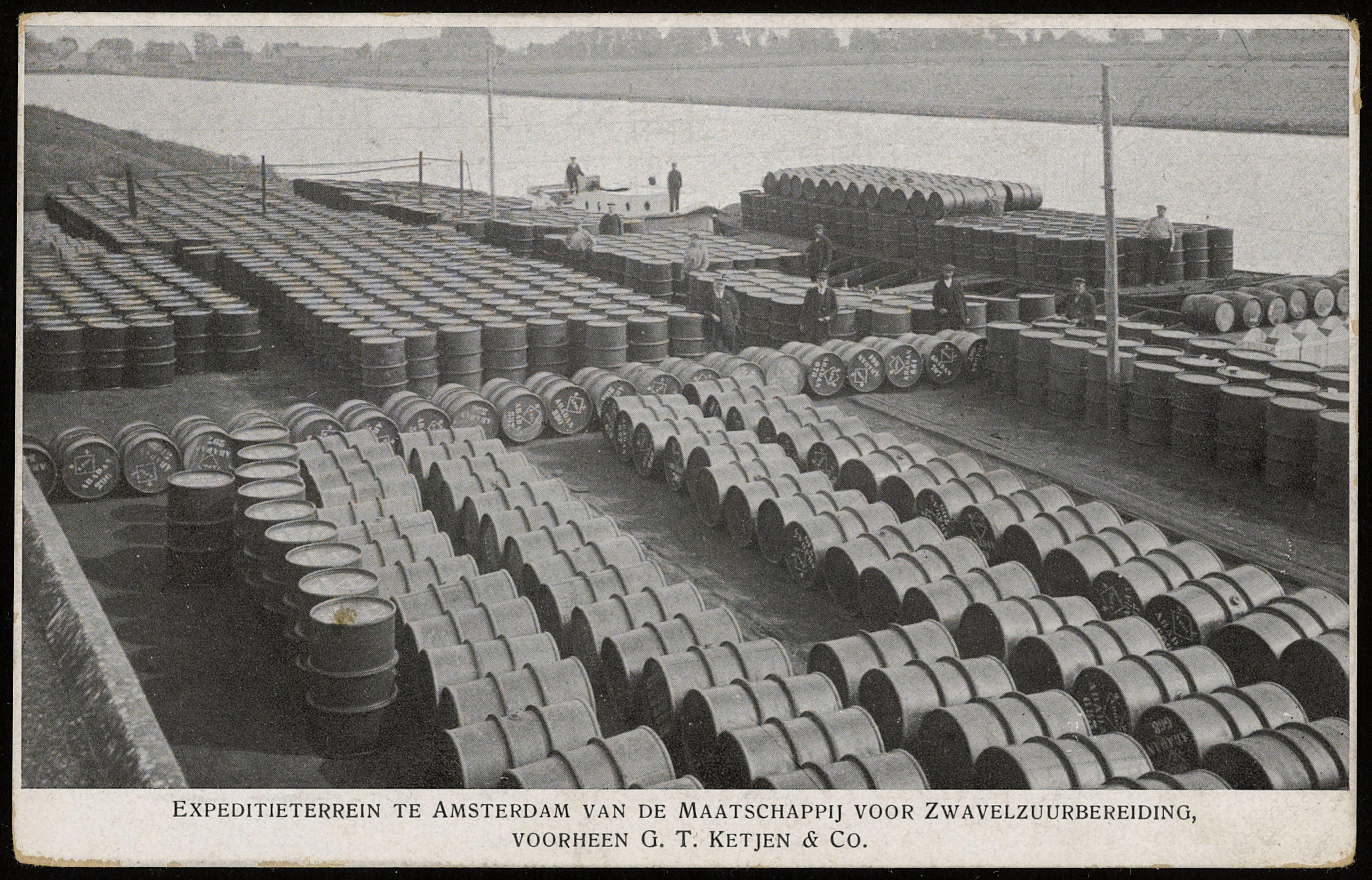 Beschrijving Nieuwendammerham, noordzijde IJ. Maatschappij voor zwavelzuurbereiding Noordzijde IJ. Maatschappij voor zwavelzuurbereiding, voorheen Ketjen, nu Akzo langs het zijkanaal K met op de achtergrond de Nieuwendammerdijk Documenttype prentbriefkaart Vervaardiger Onbekend Anoniem Collectie Collectie Stadsarchief Amsterdam: prentbriefkaarten Datering 1900 Geografische naam Nieuwendammerham Inventarissen Afbeeldingsbestand PRKBB00465000001